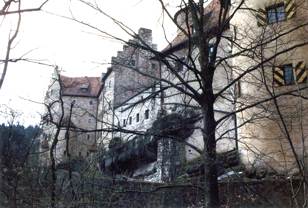 Burg Rabenstein, Ostseite